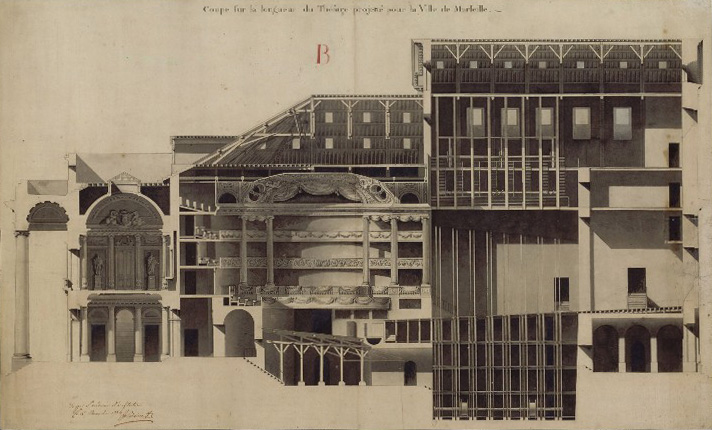 Opéra municipal de Marseille Projet du Grand-Théâtre de Marseille dressé en 1784 par Bénard : dessins de Bénard, signés par Sedaine de l'Académie d'Architecture, en date du 15 novembre 1784. Coupe sur la longueur du théâtre projetté pour la Ville de Marseille Rondel, Auguste. Quelques renseignements sur la construction de l'Opéra de Marseille et sur son inauguration le 31 octobre 1787. Bulletin de la Société d'Histoire du Théâtre, 1918-1919, p. 64-86. Expositions Exp. Le siècle des théâtres. Salles et scènes de France, 1748-1807. Paris, Bibliothèque historique de la Ville de Paris, 1999.